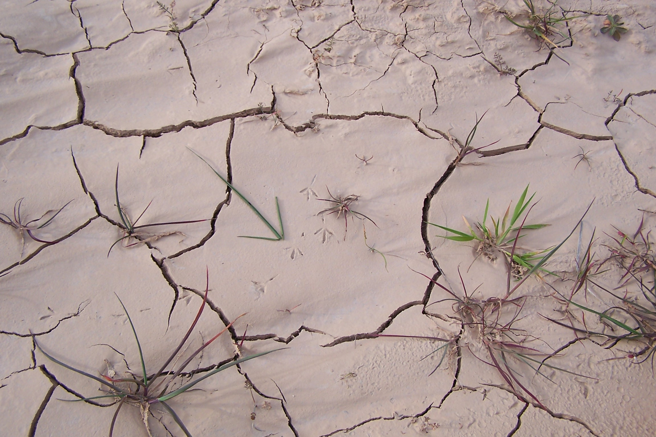 Zelf gemaakt (12 maart 2006)